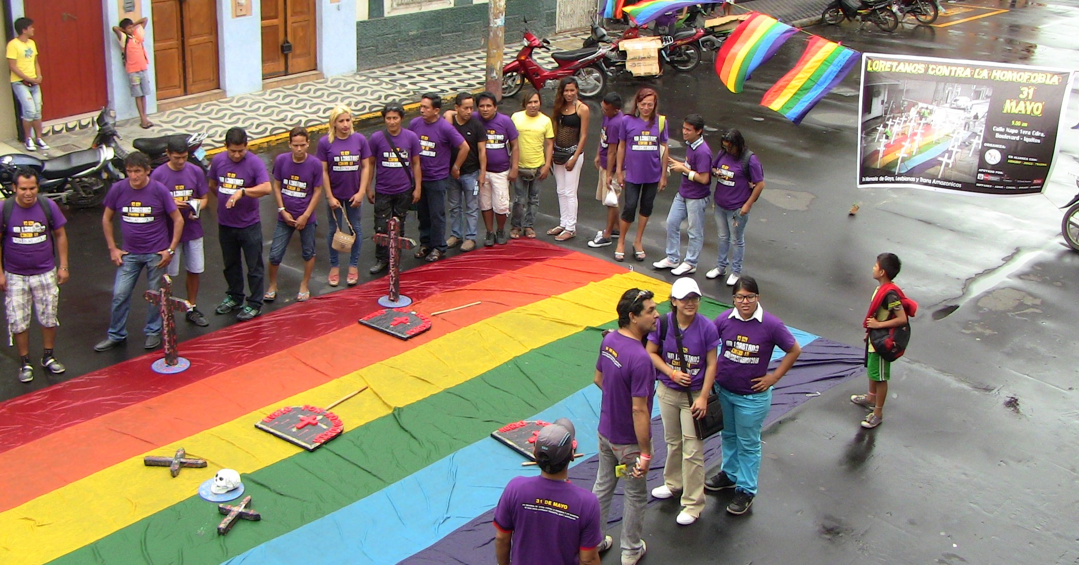 Evento en Iquitos titulado "Loretanos contra la homofobia"